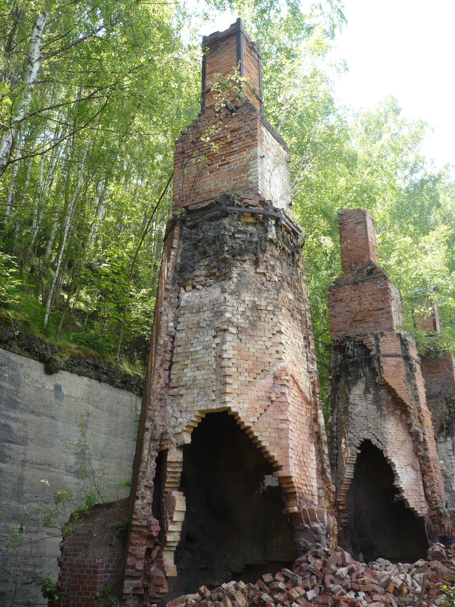 Nowa Ruda, piece do prażenia łupku